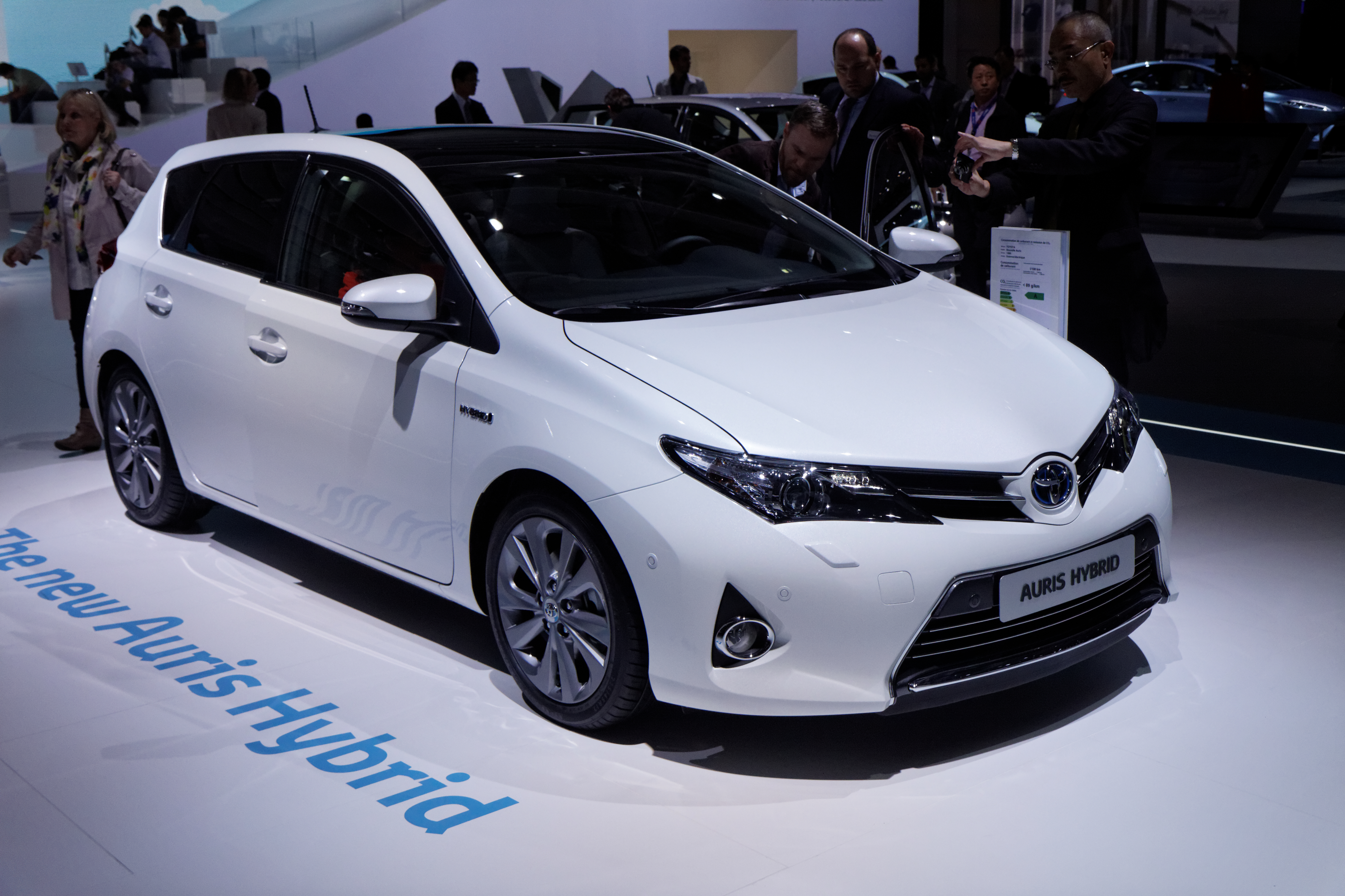 Une Toyota Auris Hybrid présentée lors du Mondial de l'Automobile de Paris 2012.